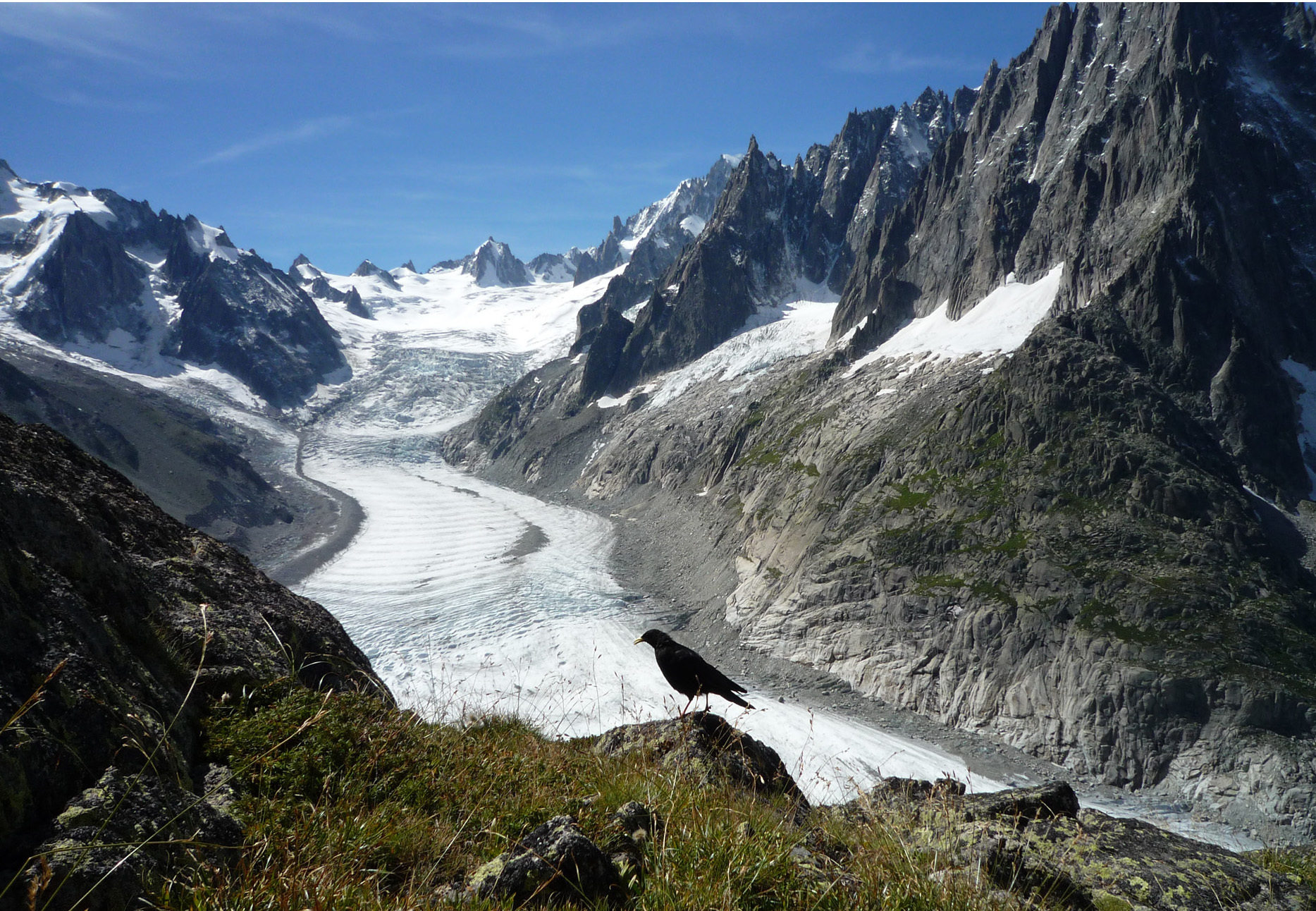 photo chocard